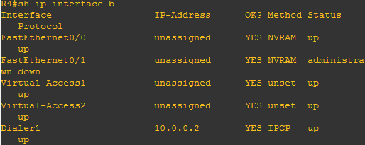 Монгол: шалгасан нь